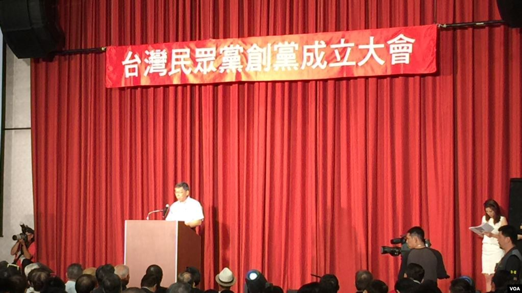 台北市市长柯文哲在台北举行台湾民众党创党大会。